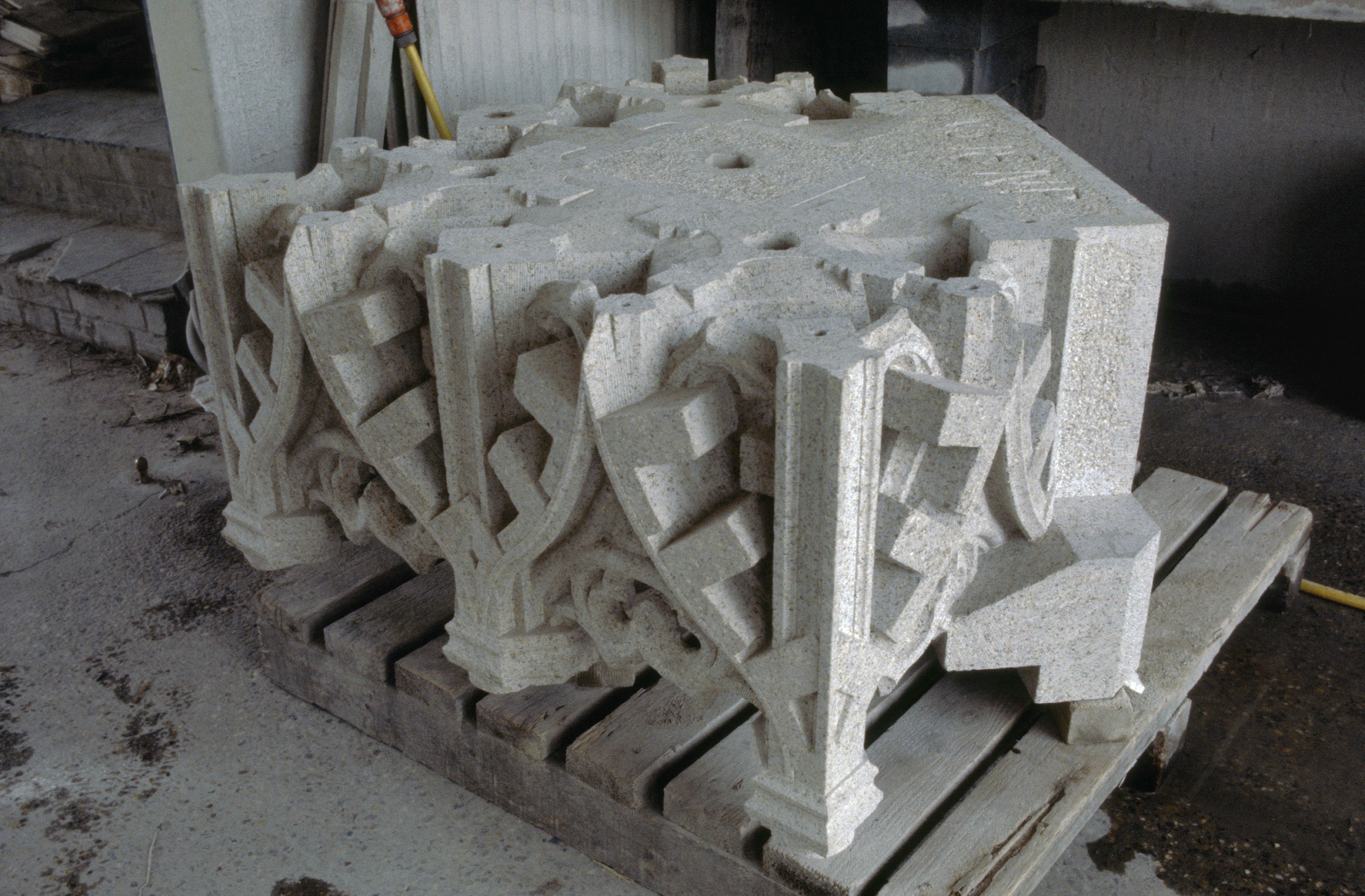 steenhouwerij: baldekijn trachiet